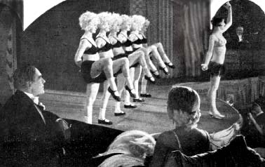 Fotogramma del film muto italiano Il Carnevale di Venezia, regia di Mario Almirante, produzione SASP Pittaluga, Torino, 1928